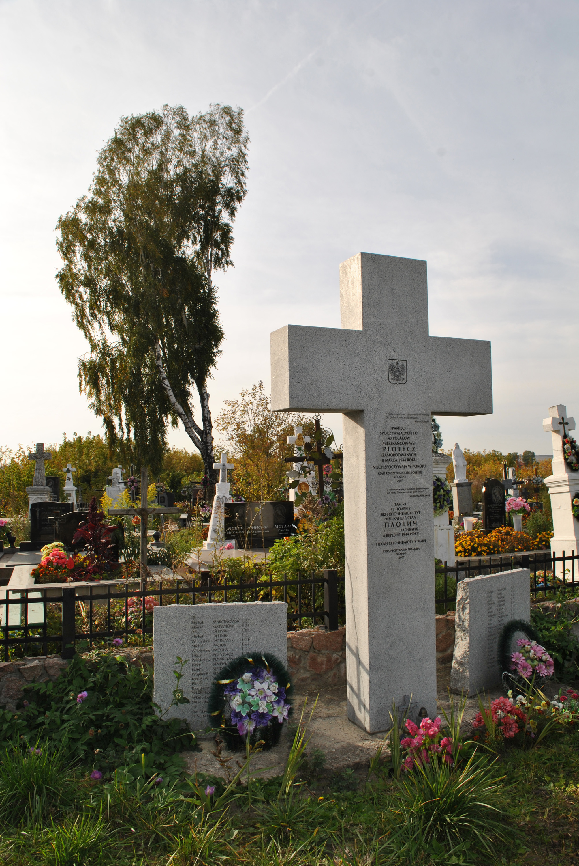 Братська могила поляків, які трагічно загинули 8 березня 1944 р. в селі Плотича Тернопільського району тернопільської області.